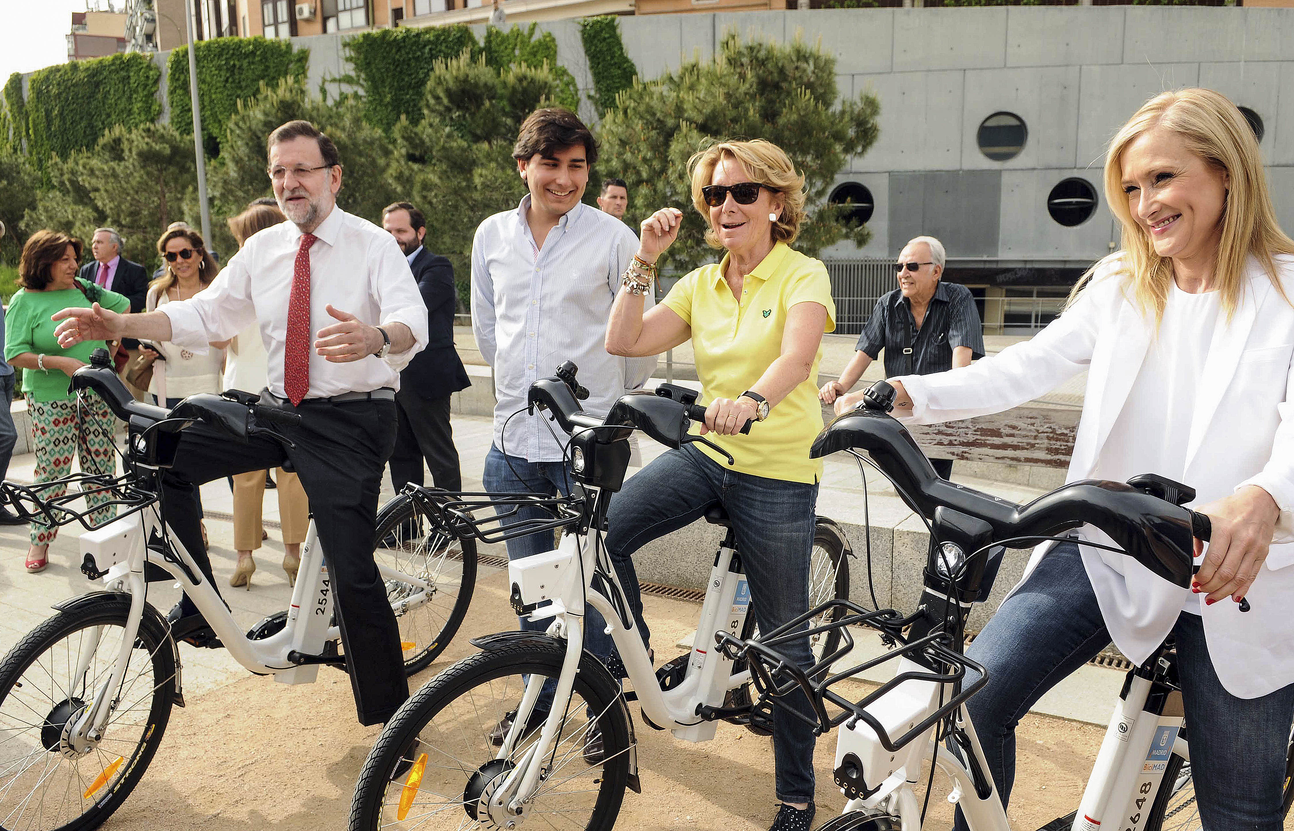 Paseo en bici por Madrid Río durante la campaña electoral de las municipales y autonómicas de 2015